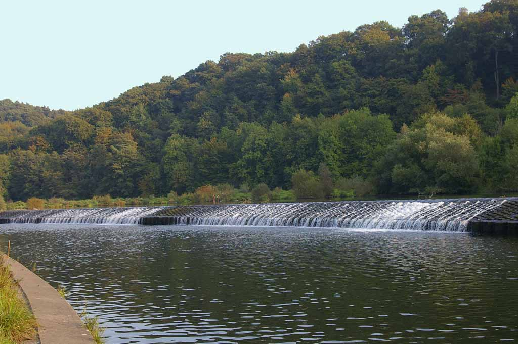 Ruhr-Wehr zwischen Heven (vorne) und Herbede (hinten) in Witten, der Wald im Hintergrund gehört zum NSG Hardenstein